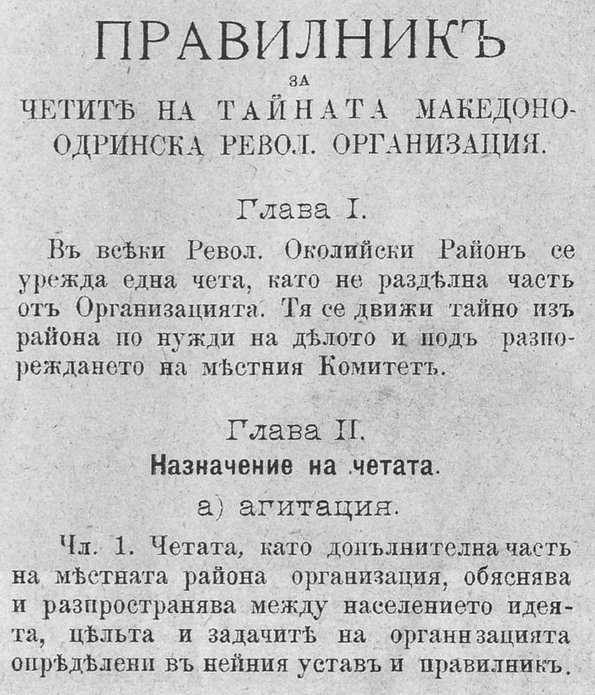 Правилник на четите на ВМОРО.